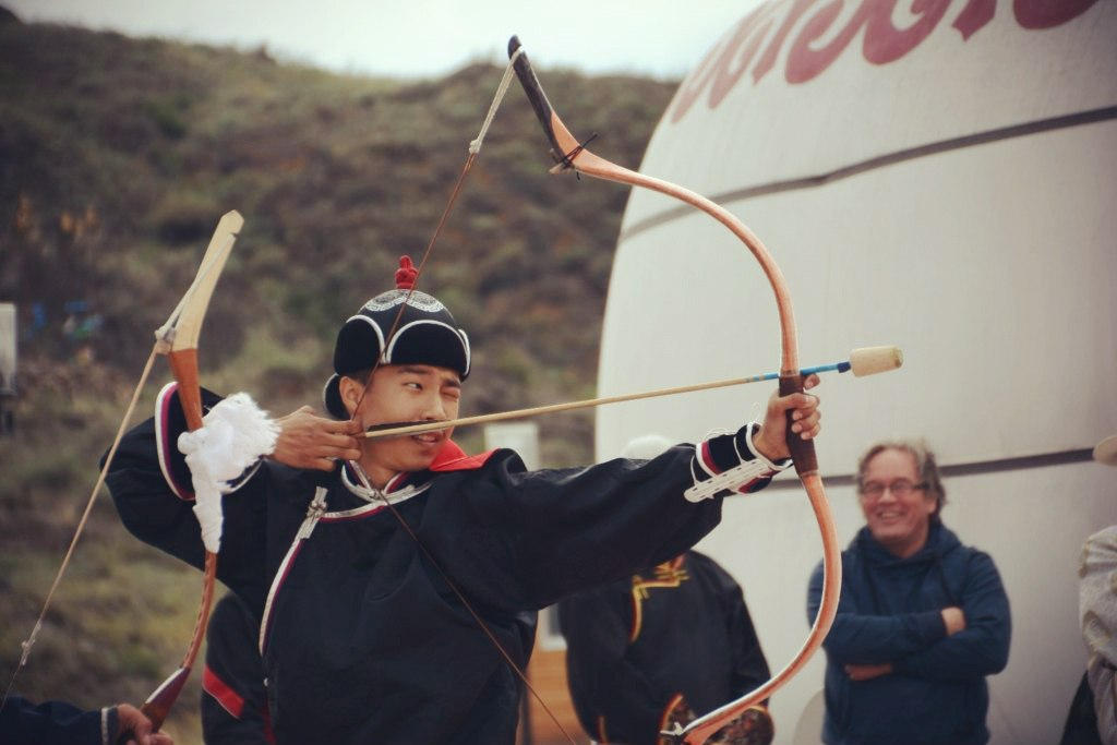 традиционный тувинский лук